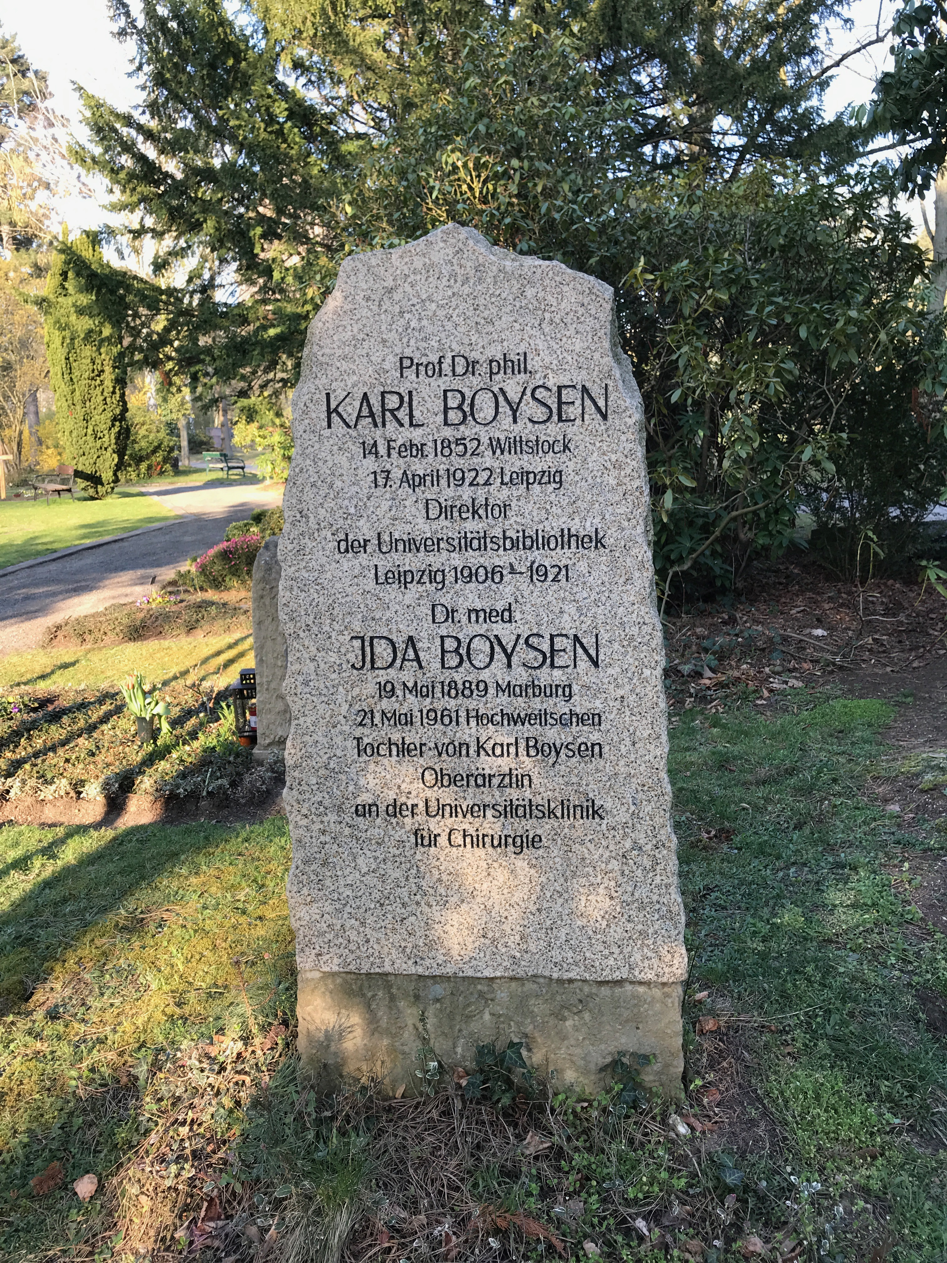 Grabmal von Karl Boysen und seiner Tochter Ida Boysen auf dem Leipziger Südfriedhof